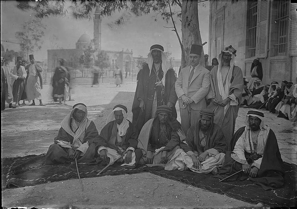 השייכים של שבט עזאזמה. בינהם מושל נפת באר שבע, עארף אל-עארף